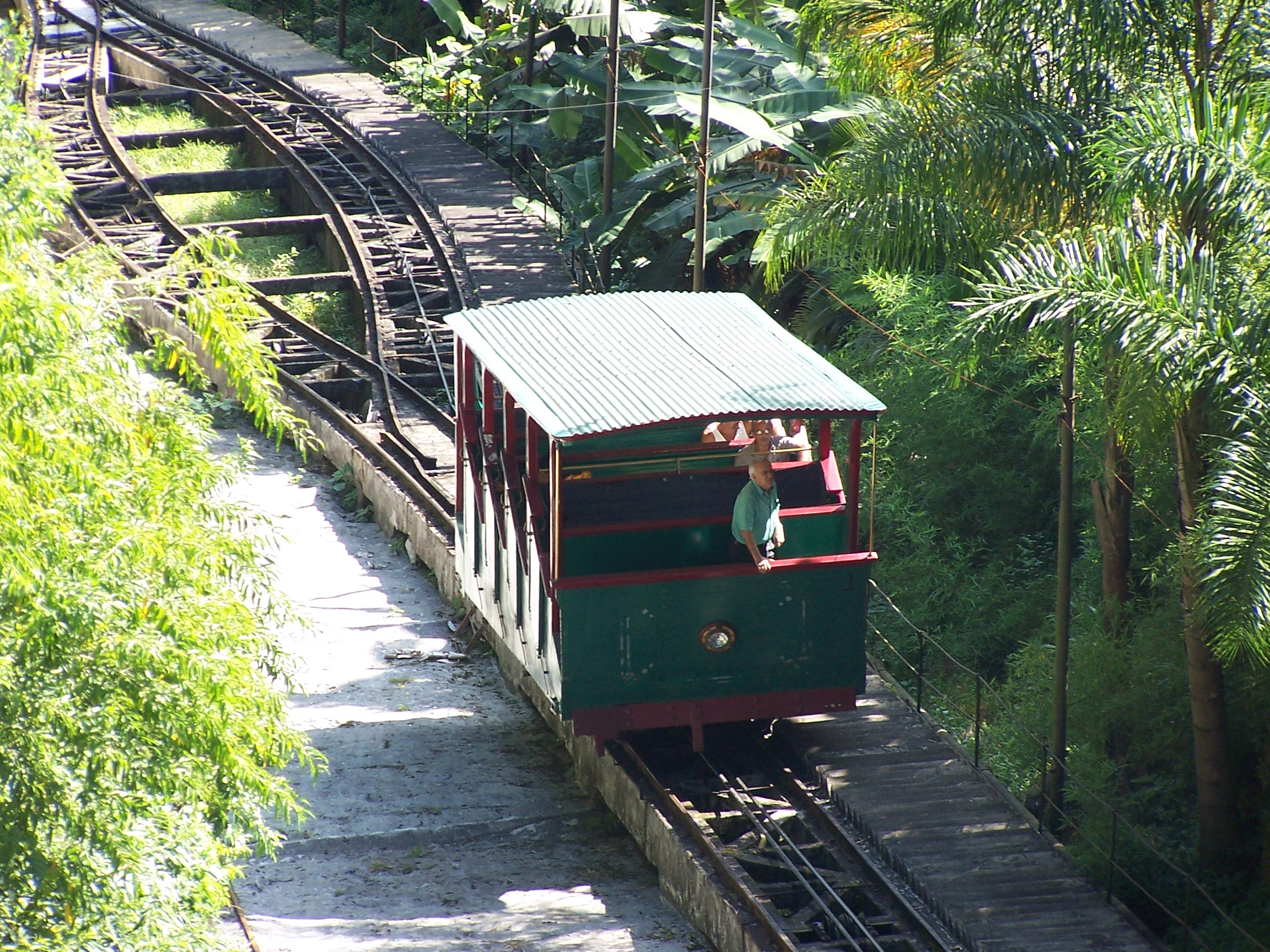 Sistema Funicular do Monte Serrat - Santos - SP - Brasil, Foto de Paulo Carmona Sanches Neto - 2005